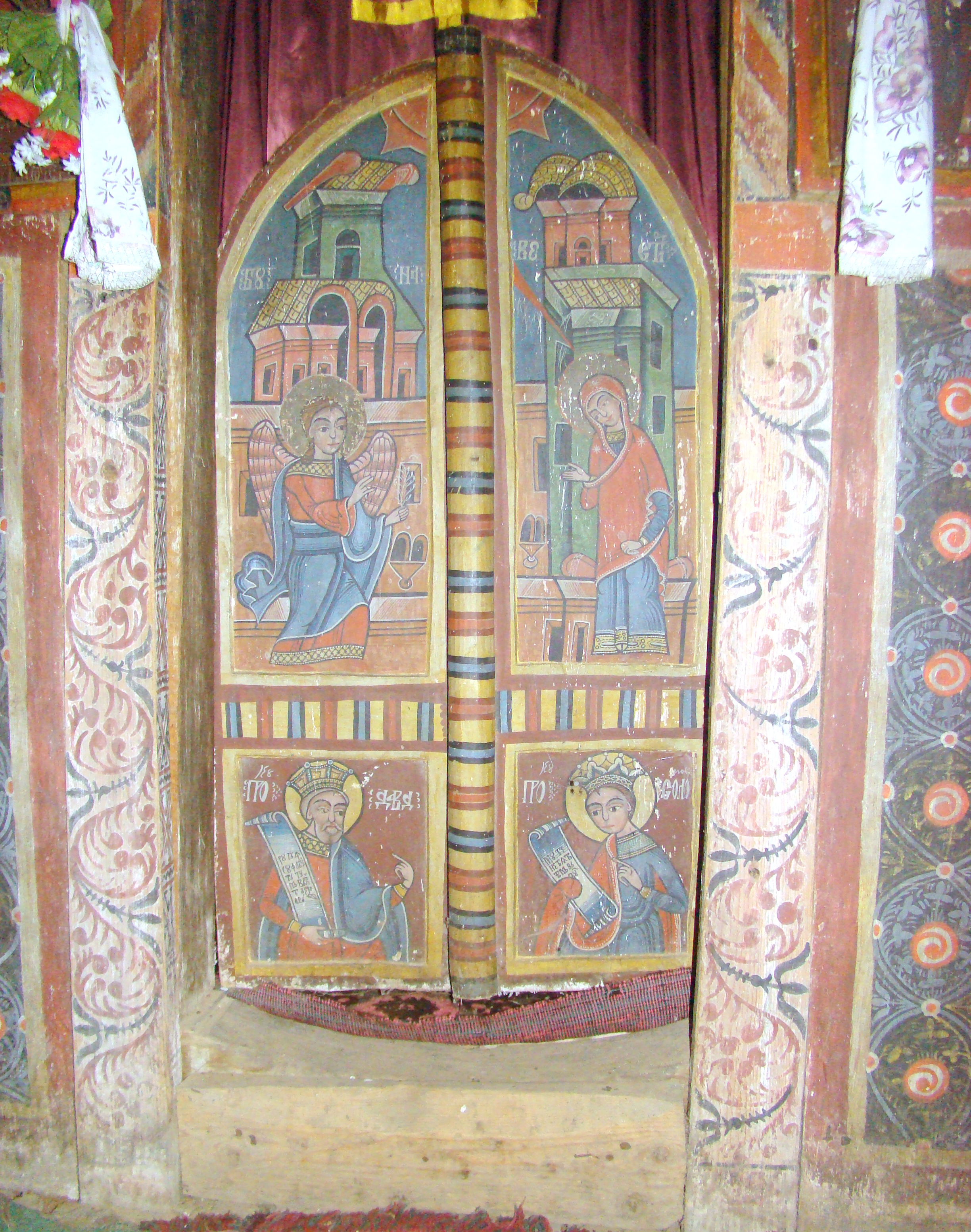 Biserica de lemn „Intrarea în Biserică a Maicii Domnului” din Crasna, județul Gorj